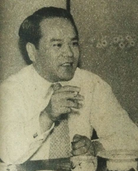 中垣國男